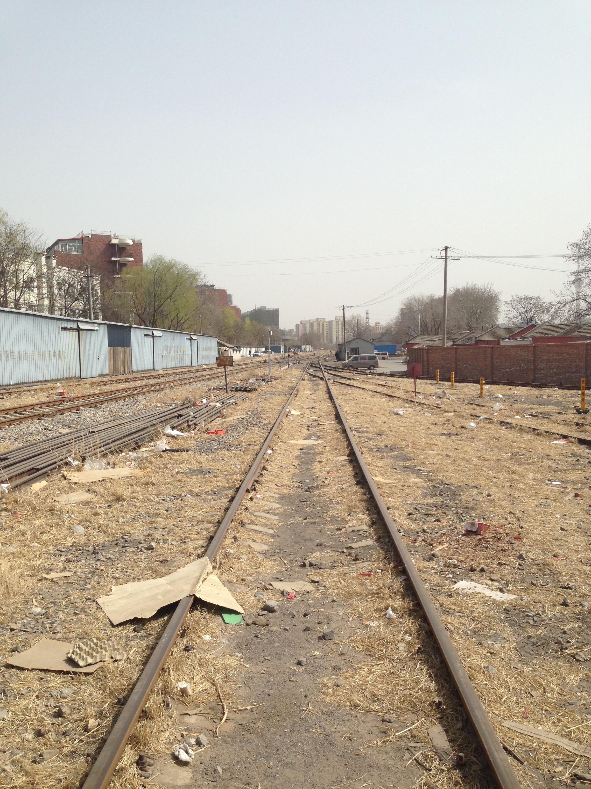 五路火车站以东